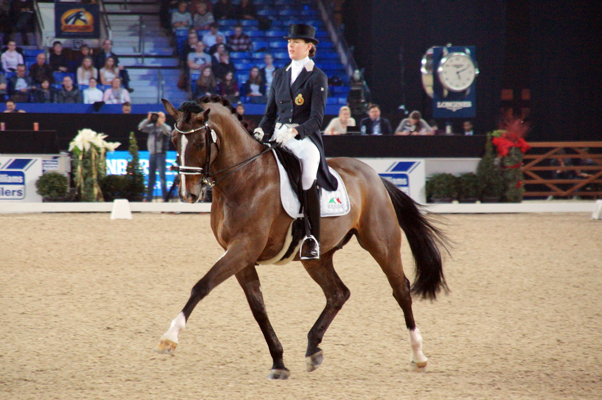 Jorinde Verwimp and Tiamo